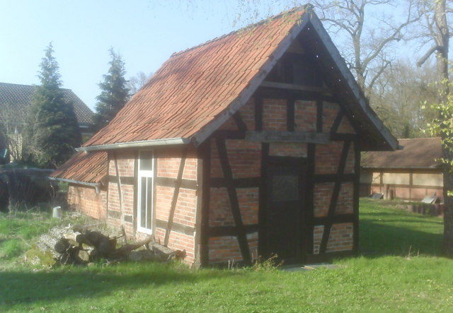 Kirchlinteln: Backhaus